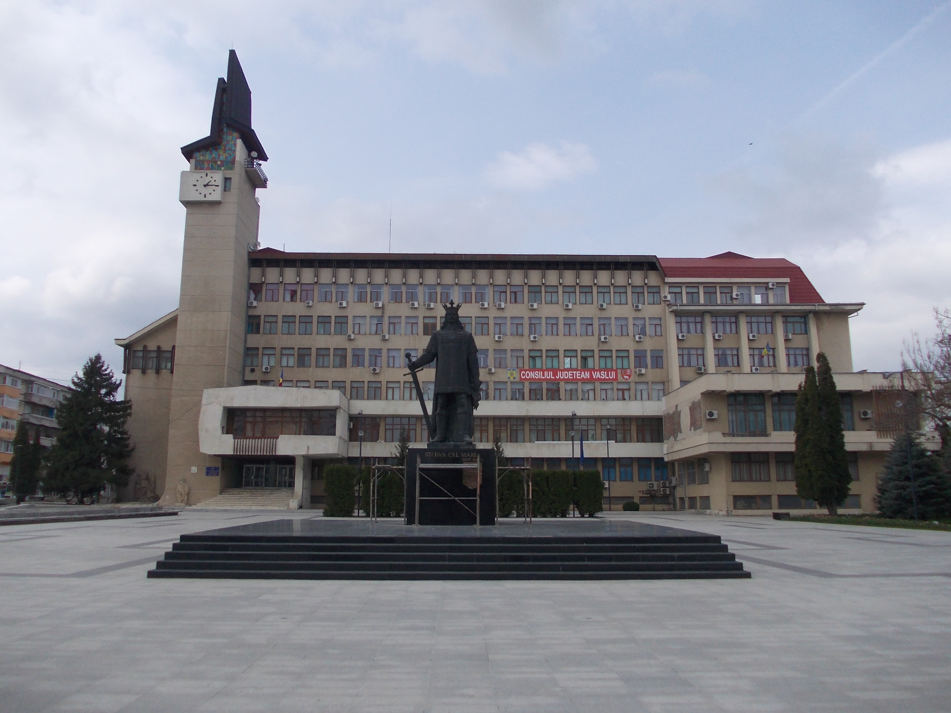 Palatul Administrativ Vaslui